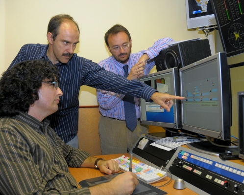 Els responsables de l'Espai Internet: Antonio Novella (Saragossa, 1959) i Jordi Aguilera (Sabadell, 1966)